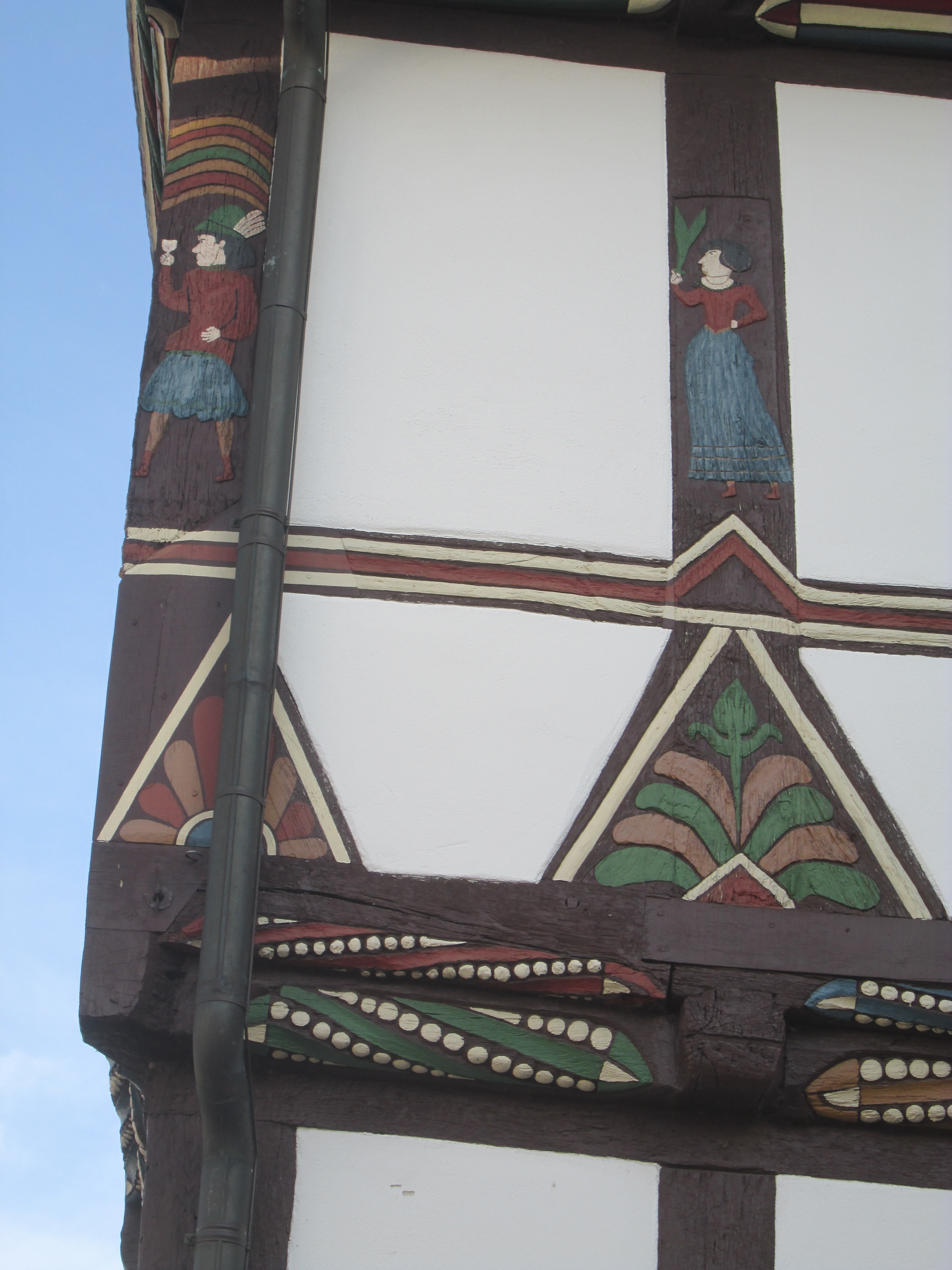 Haus Böttrich, Sternstr. 13 in Warburg